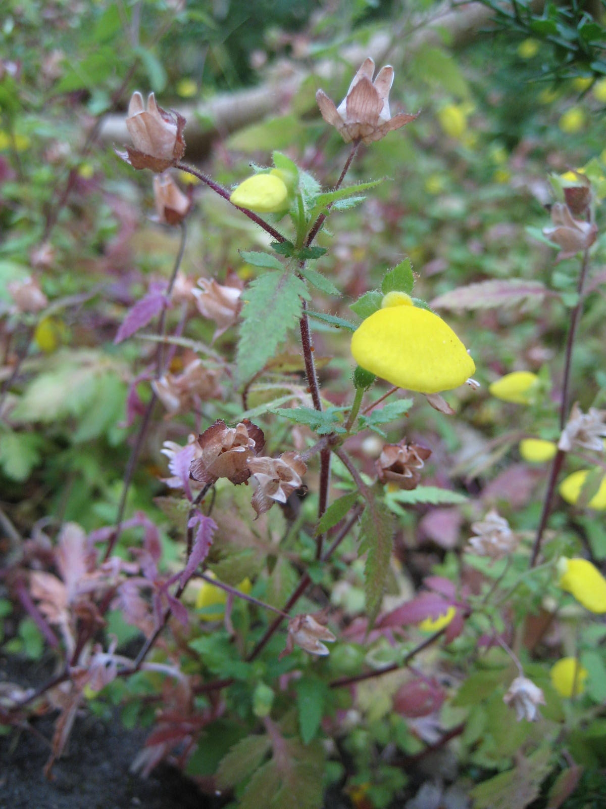 Calceolaria tripartita - Blüte - Bot. Garten Berlin Dahlem